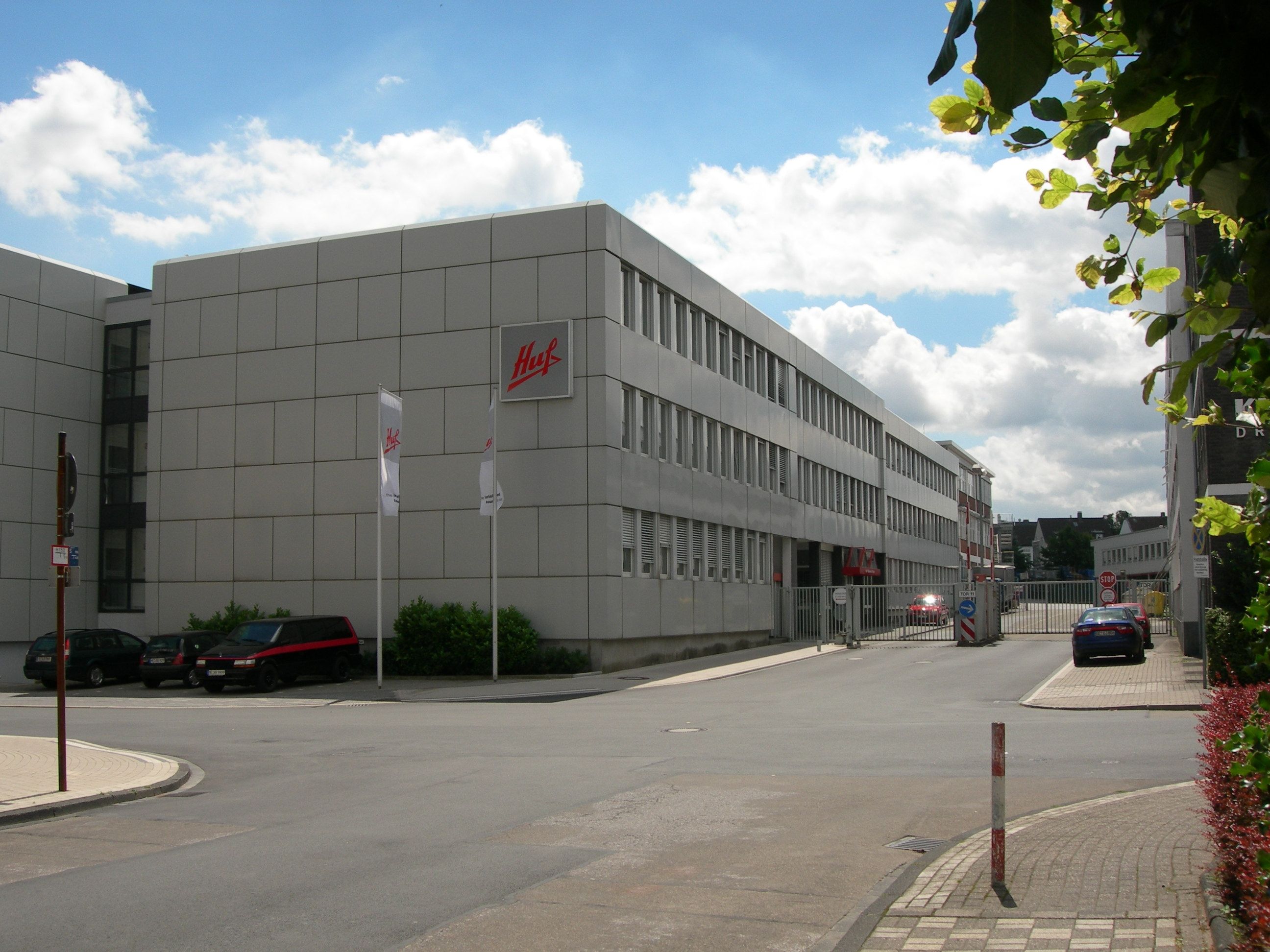 Huf Hülsbeck & Fürst, Stammwerk Velbert, Steeger Str.